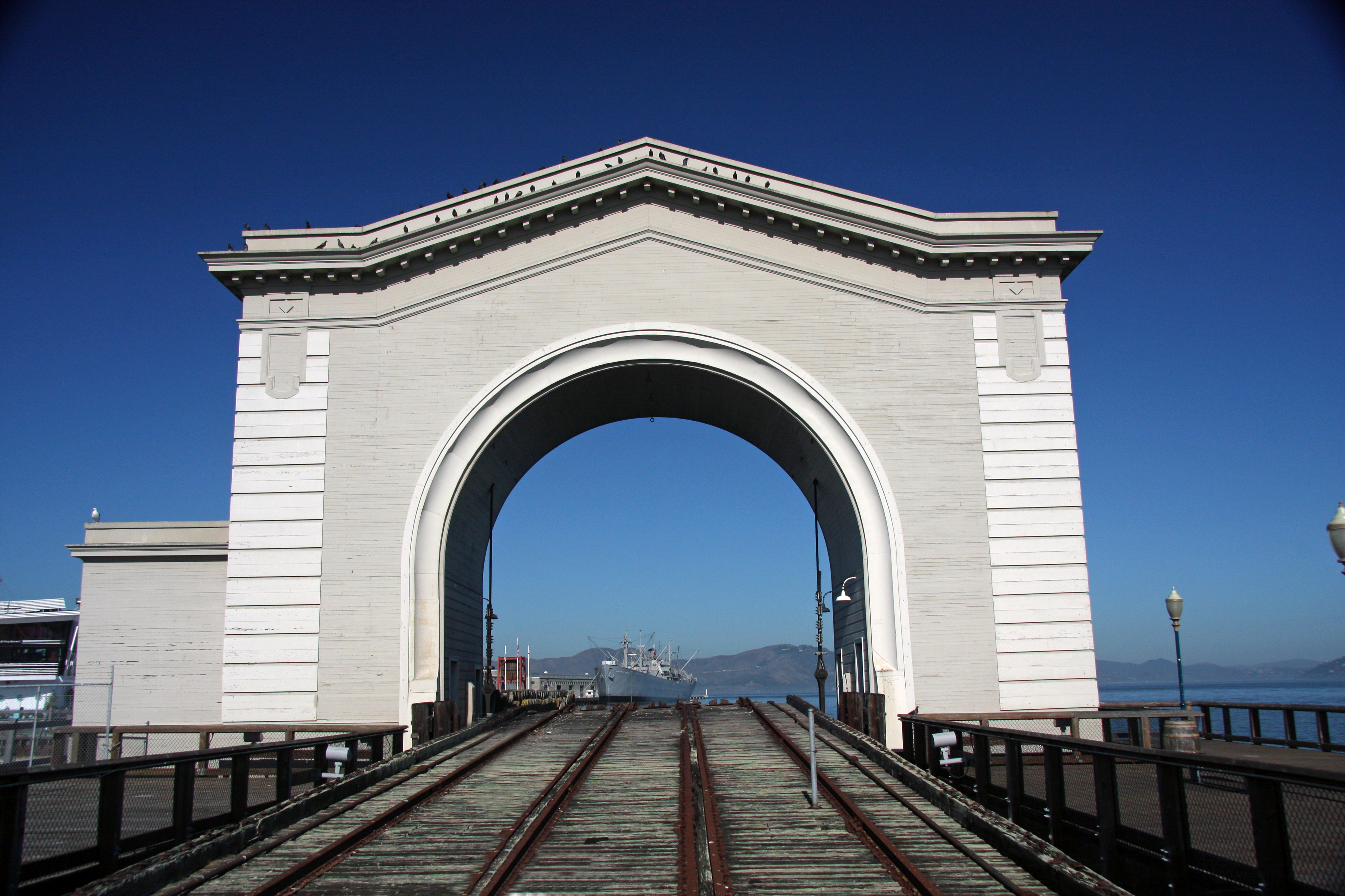 San Francisco 19